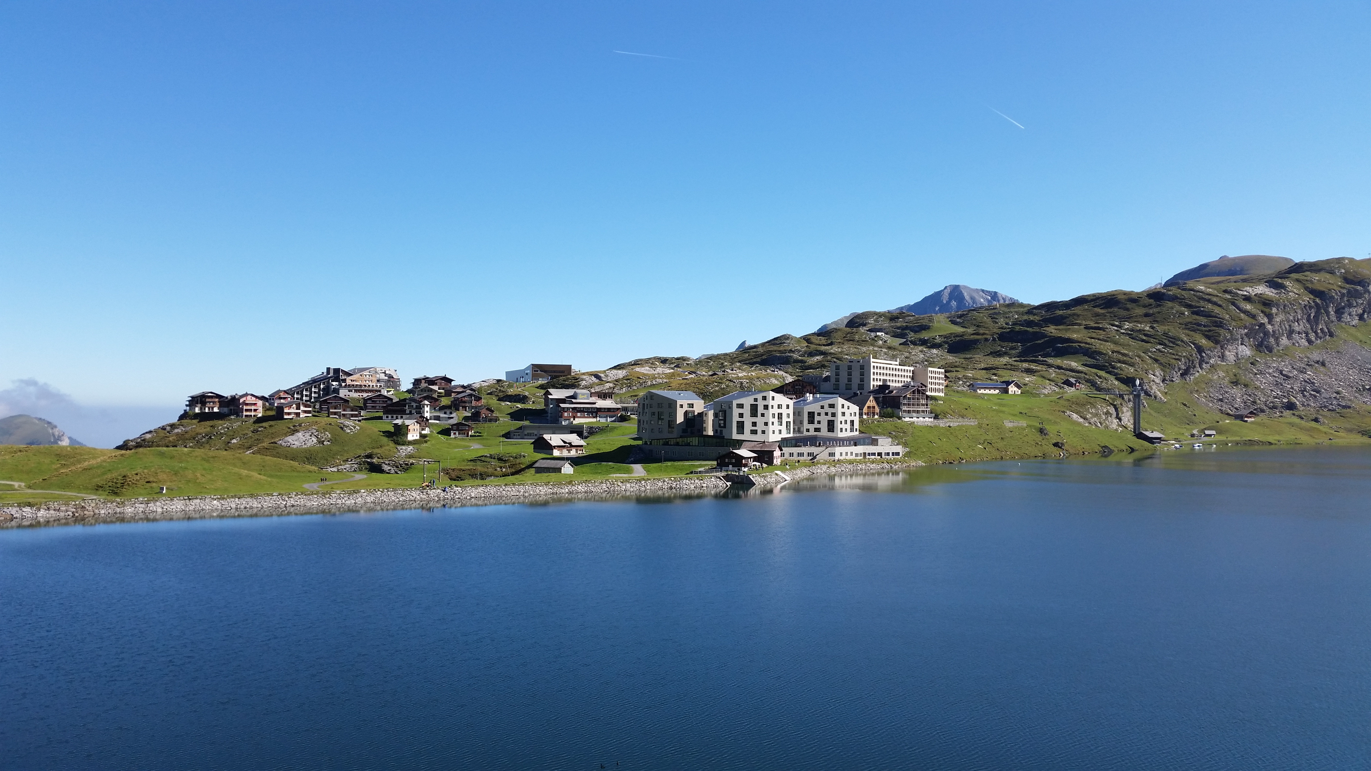 Melchsee-Frutt mit dem Melchsee, 2018 – Wikipedians at holidays